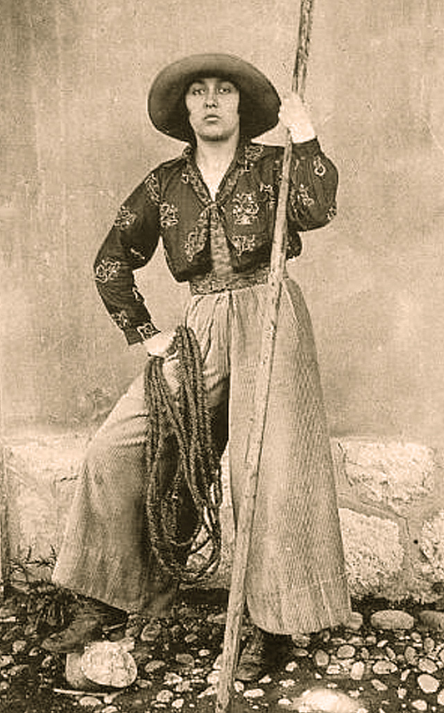 Henriette Dibon, dite Farfantello, en tenue de travail en Camargue 1925